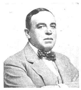 Fotografía del Dr. Daniel Juan Cranwell (1870-1953), médico argentino de origen irlandés.